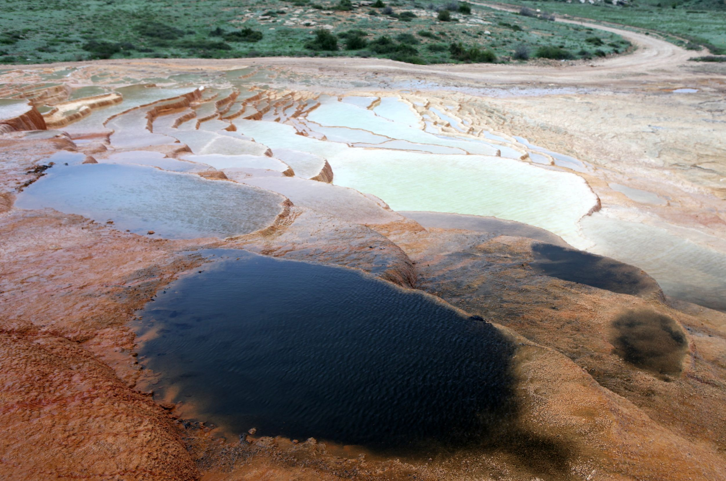 Badab e Surt Spring